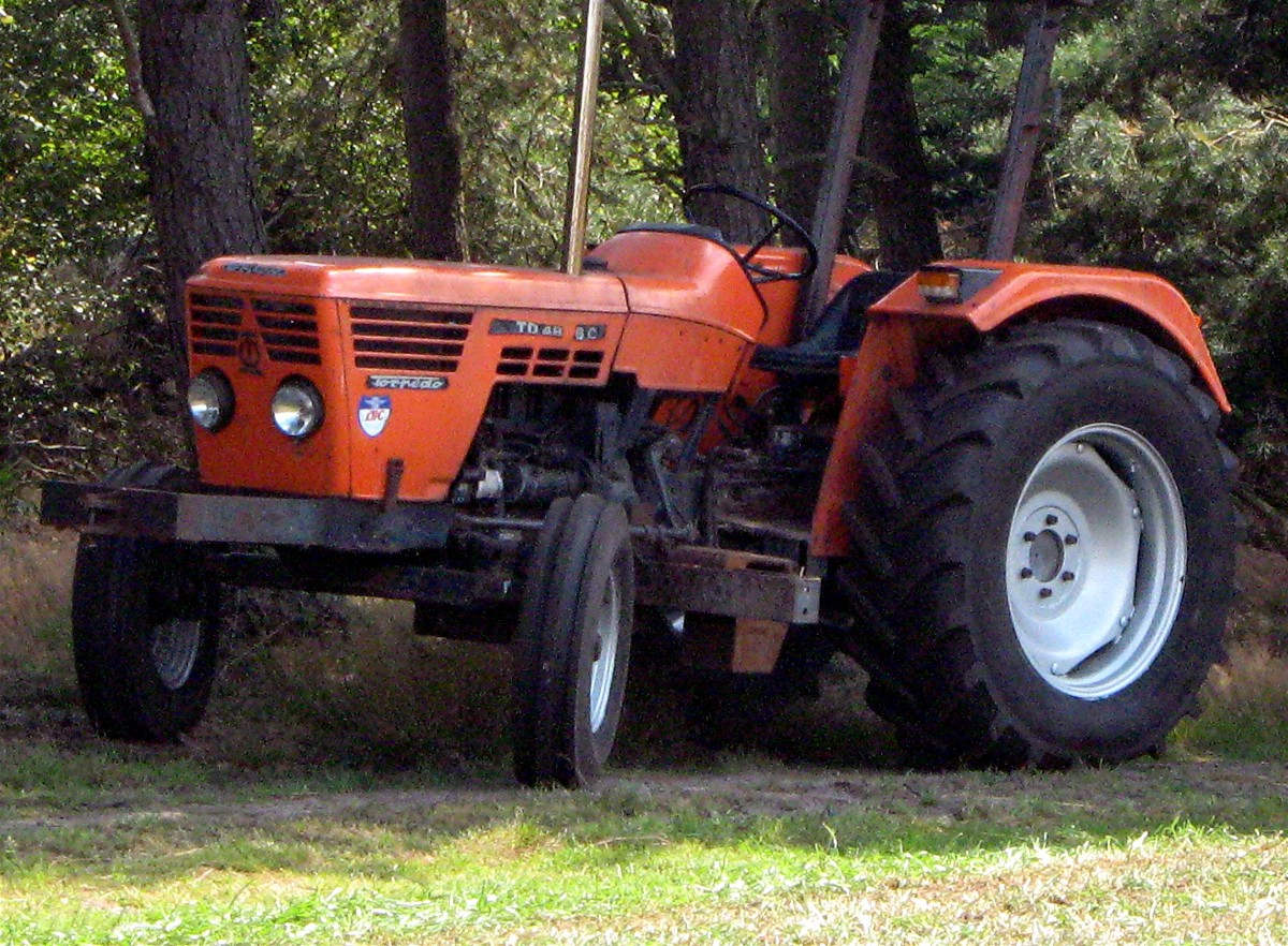 Torpedo-Traktor (jugoslawischer Lizenznachbau eines Deutz der D-06-Serie), Vliegfeld Weelde, 21. Oldtimer-Festival des Historische Machineclubs Kempen, 2009